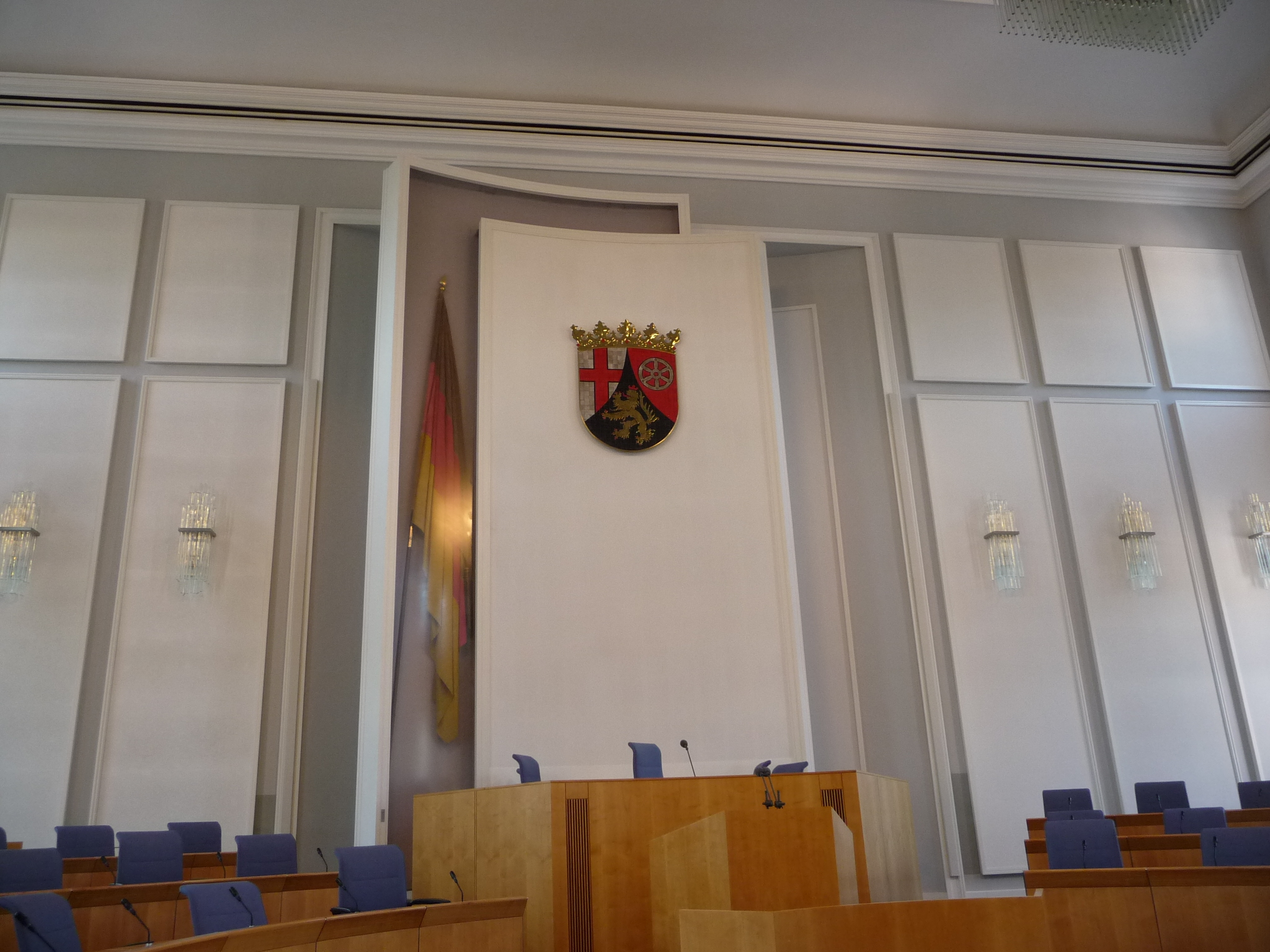 Landtag Rheinland-Pfalz